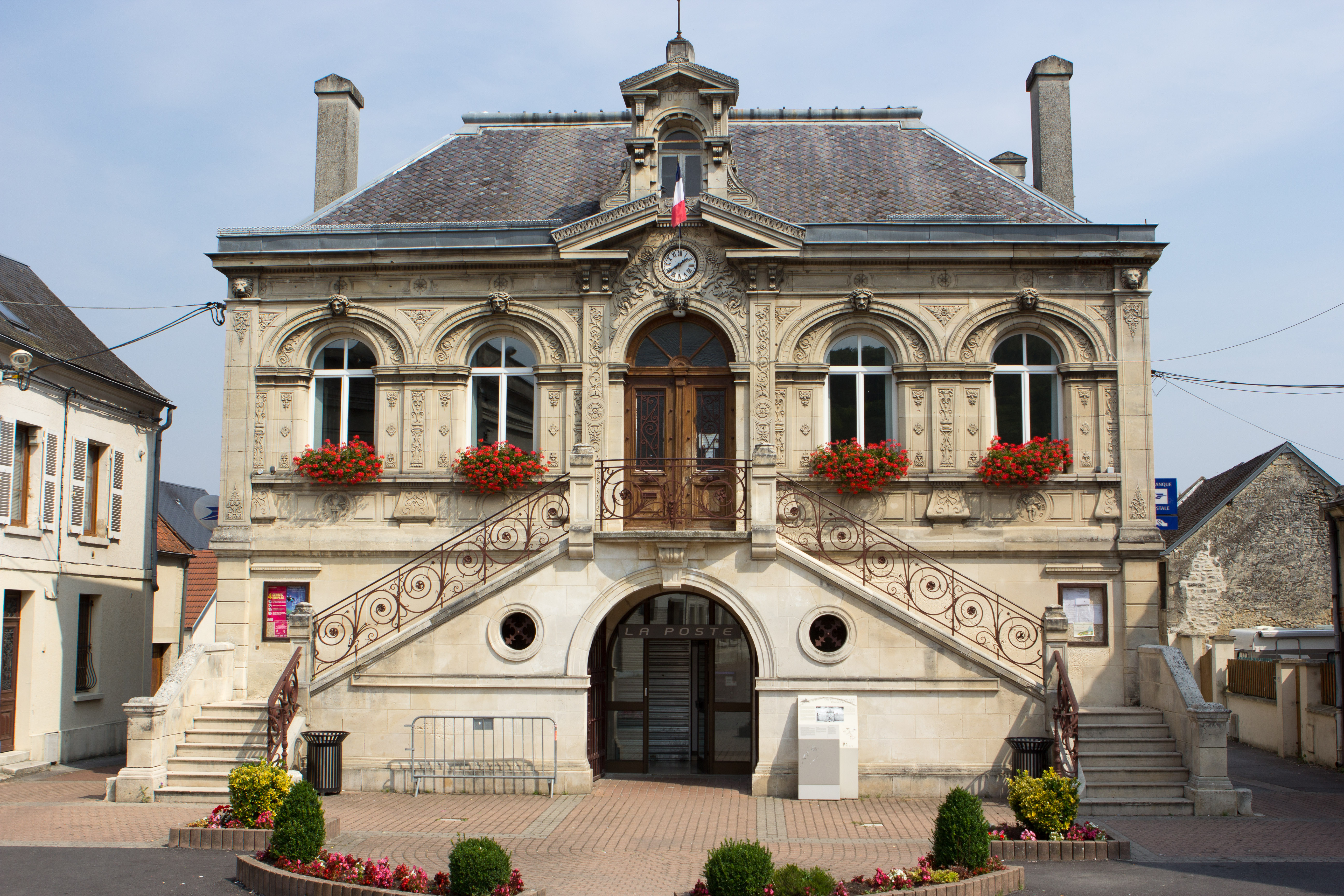 Mairie de Bruyères-et-Montbérault / Bruyères-et-Montbérault, Aisne, France